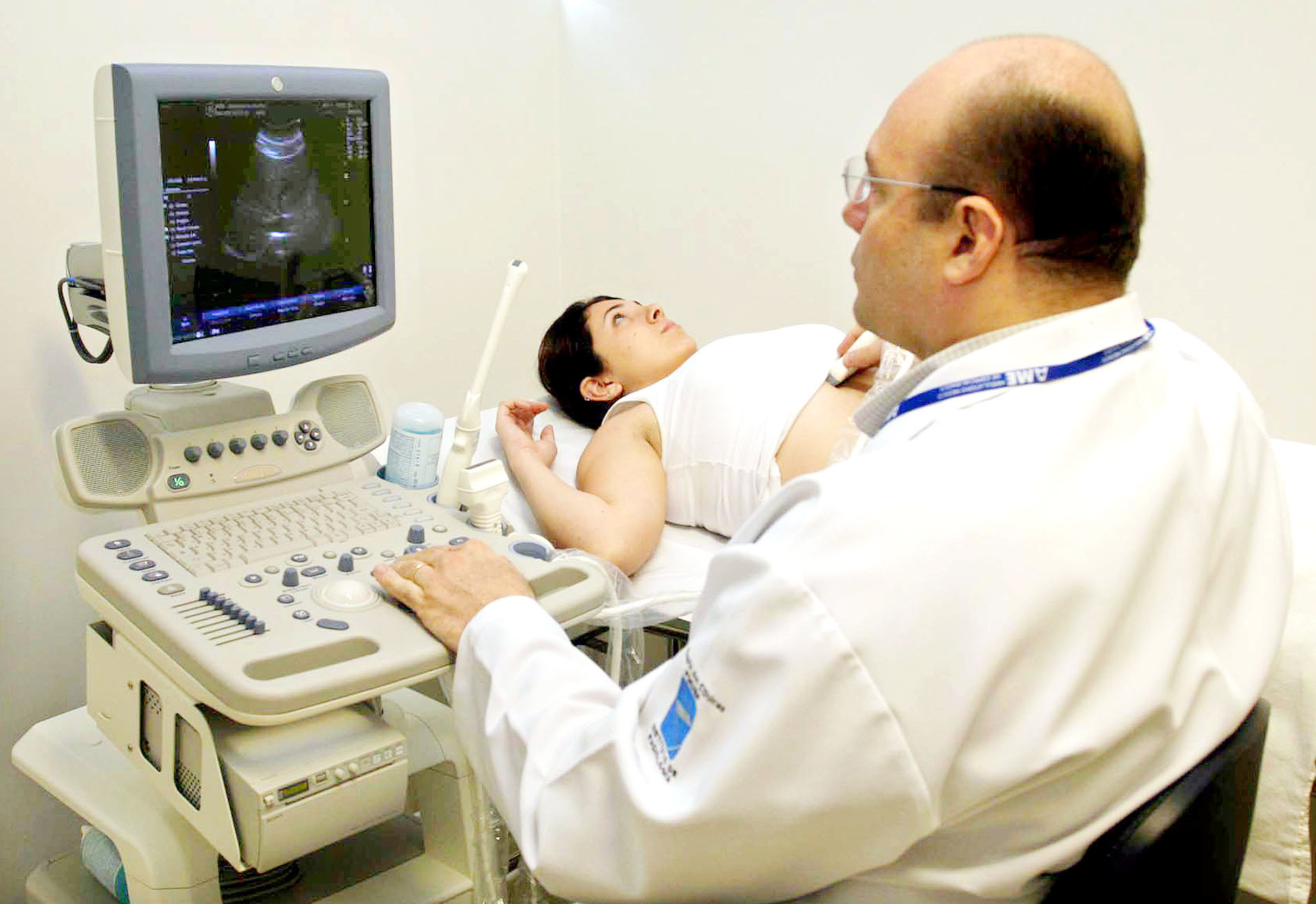 Aparelho de ultrassom